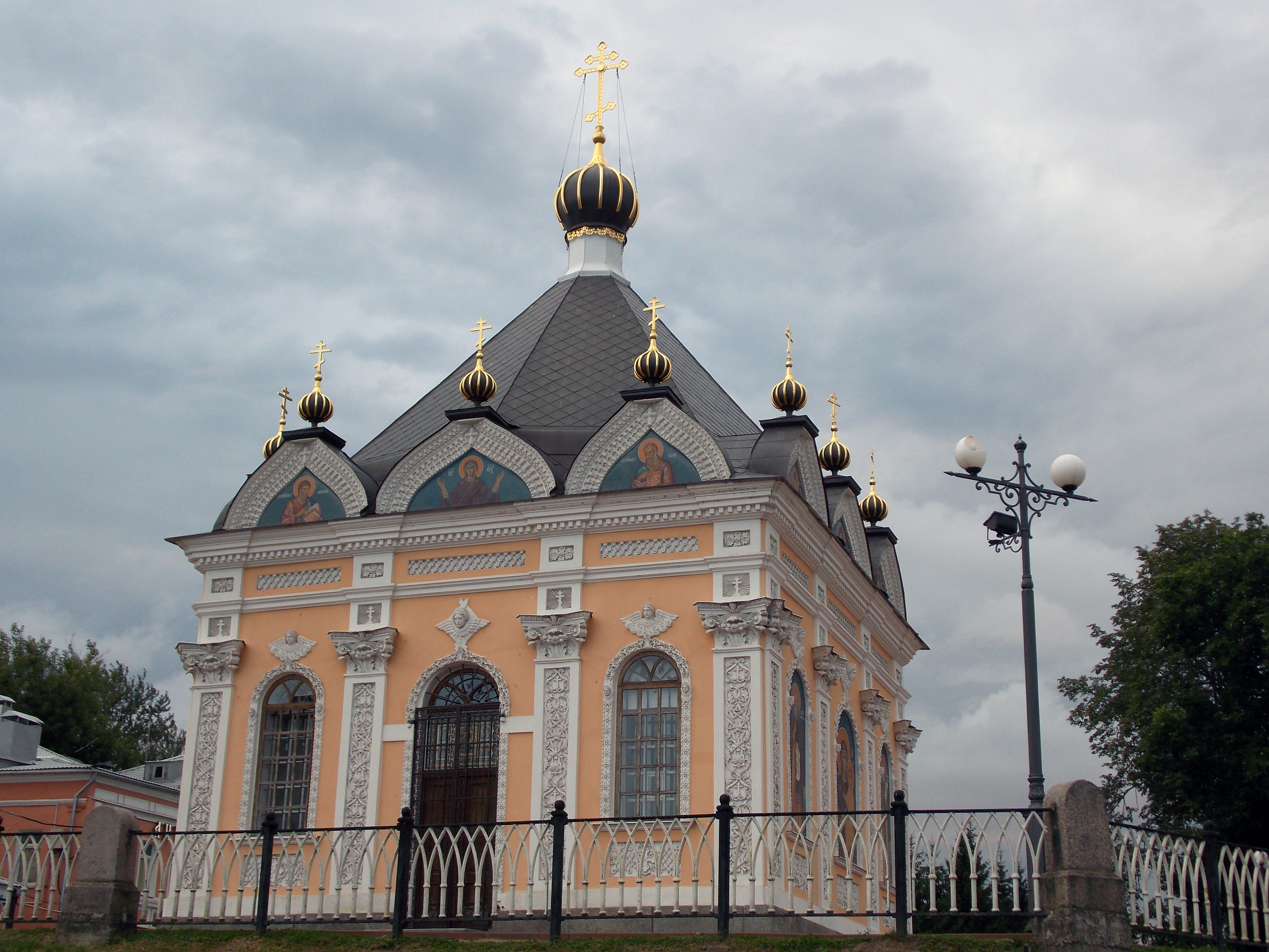 Часовня Никольская: набережная Волжская, 6, Рыбинск, Ярославская область